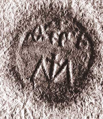 Seal of Mozyr Boyar Fyodor Kobyzewicz, displaying Kobyzewicz family's arms. 1553.